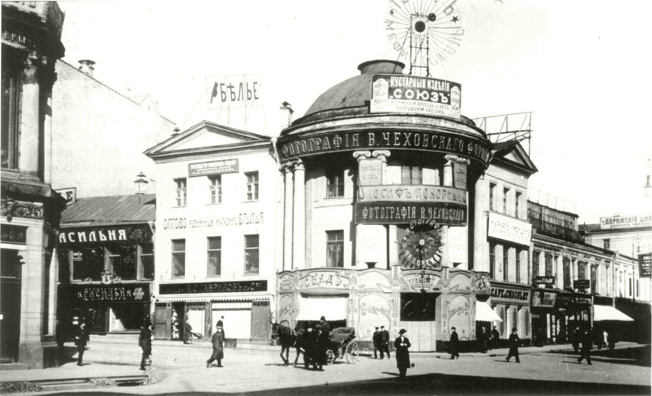 Дом Анненковых на углу Петровки и Кузнецкого Моста